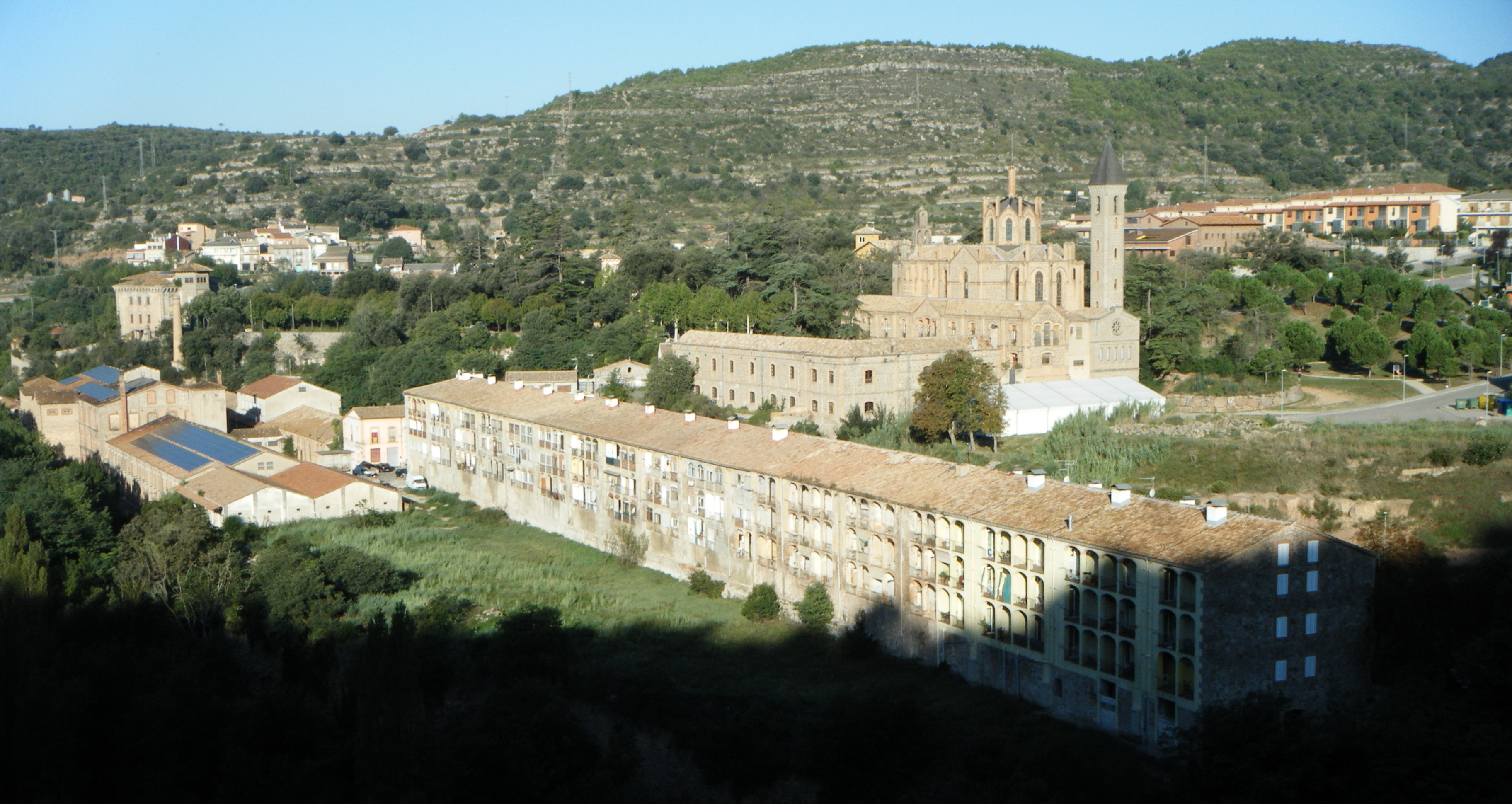 Cal Pons vist des de l'altra banda del riu, per on passa la C-16